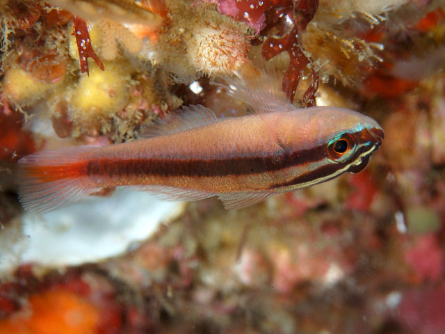 イチモンジハゼ Trimma grammistes